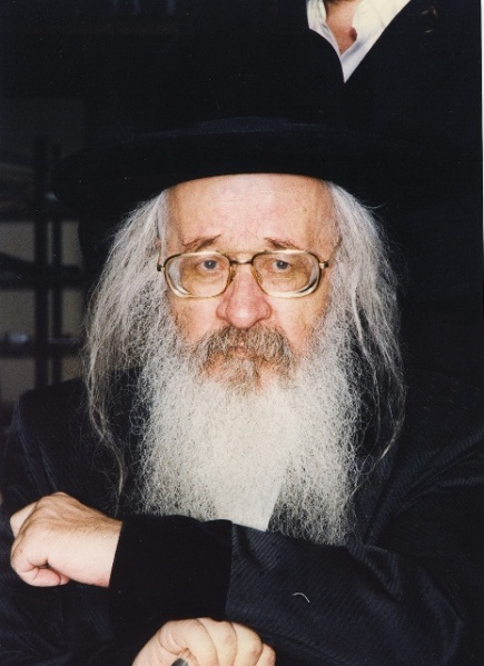 רבי דוד מתתיהו רבינוביץ מביאלא בני ברק